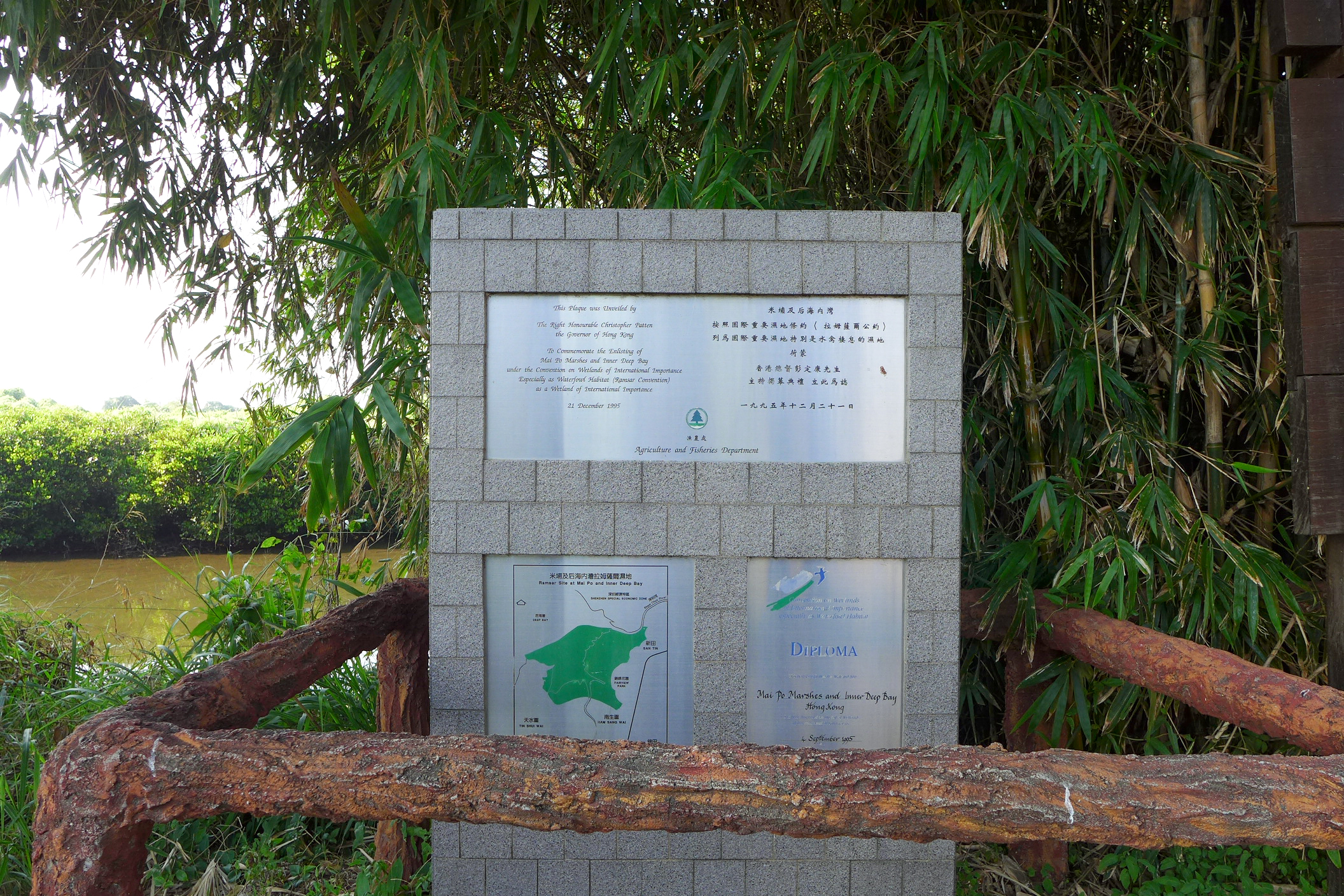 Mai Po Marshes Plaque